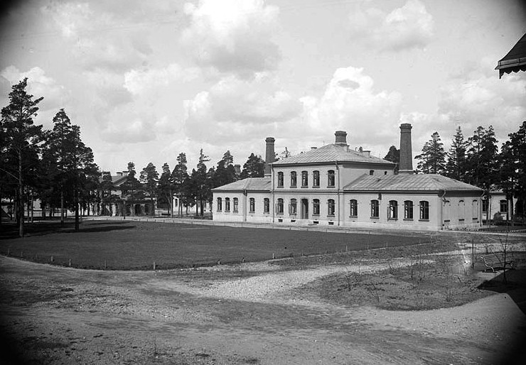 Epidemisjukhuset, Roslagstull. Sedermera Roslagstulls sjukhus.